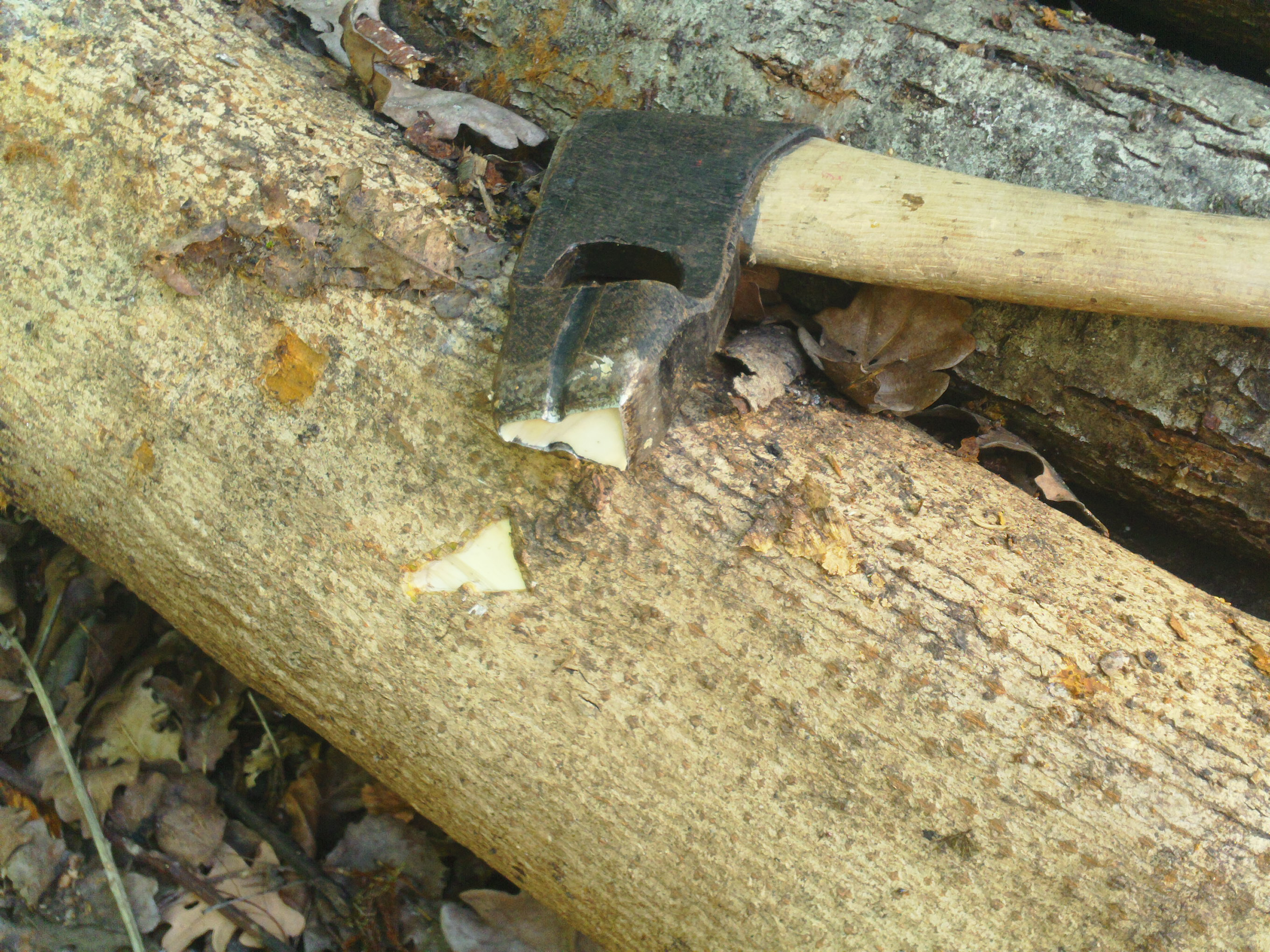 Merkeøks (Blinkeøks) fra 1960-tallet